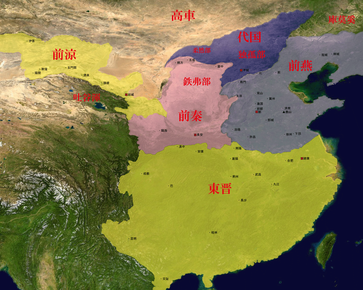 五胡十六国時代の東晋、前秦、前燕、前涼、代国の領域。